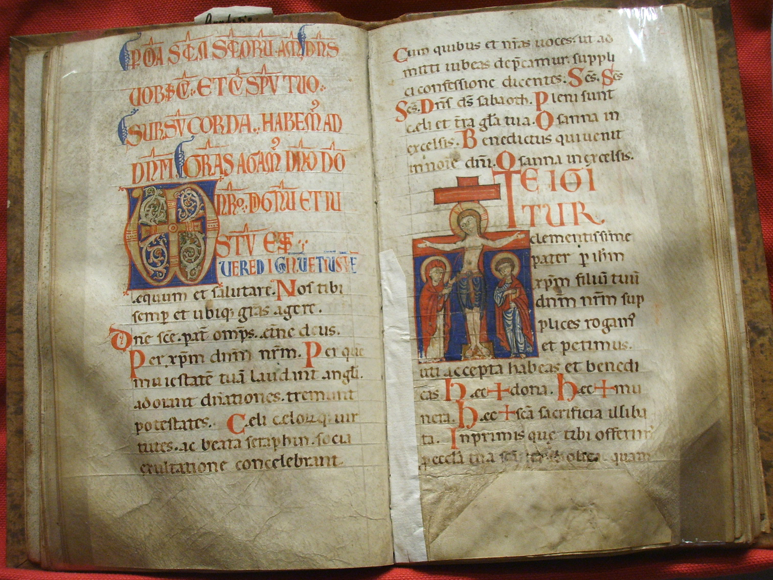 Modena, archivio capitolare, messale ms. O.I. 8, ultimo quarto del XII secolo